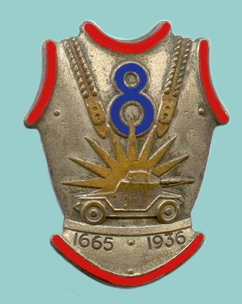 Insignie du 8e régiment de cuirassiers (France) Insigne de 1936